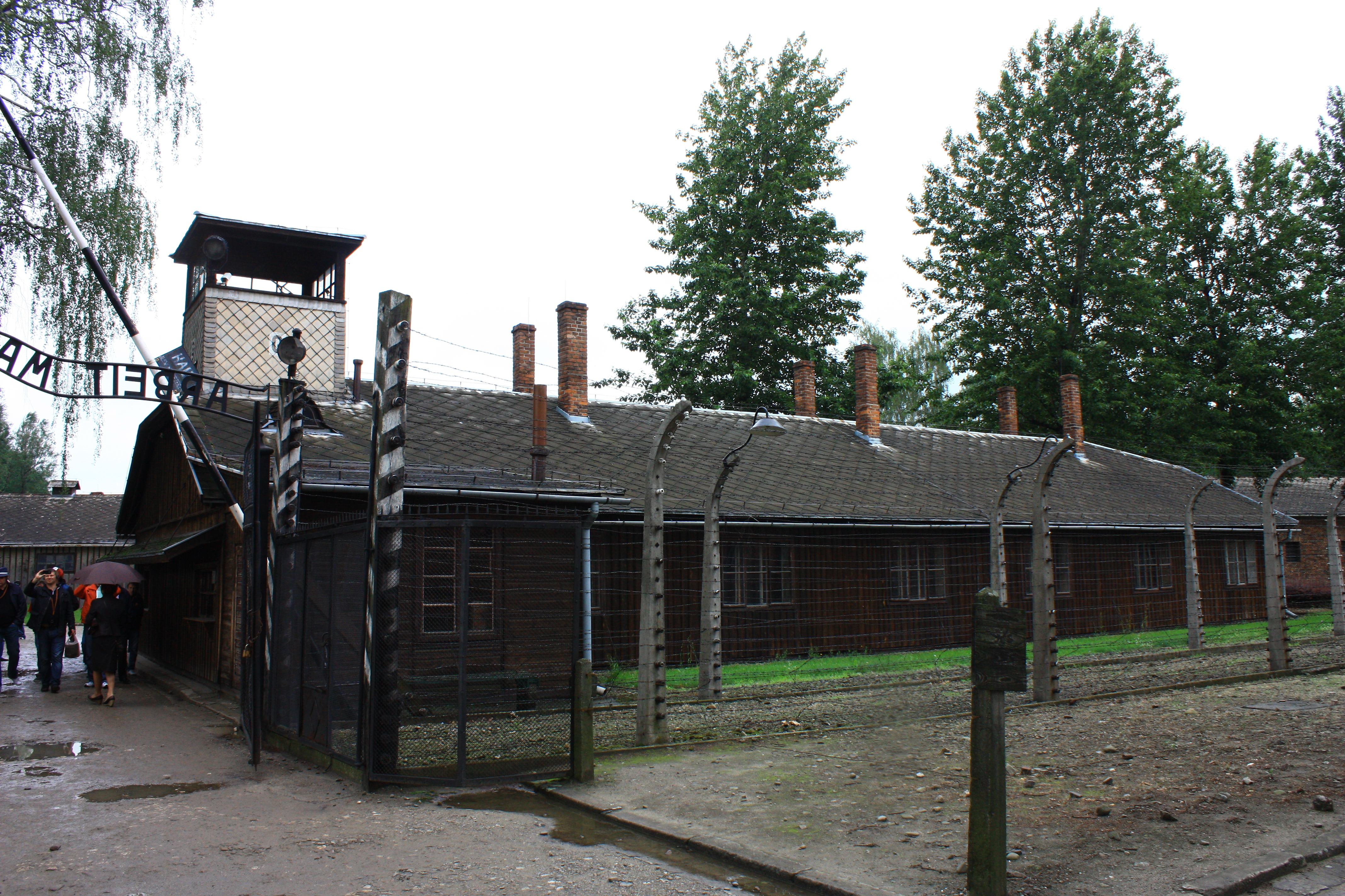 Oświęcim, obóz koncentracyjny "Auschwitz-Birkenau", 1940-1945